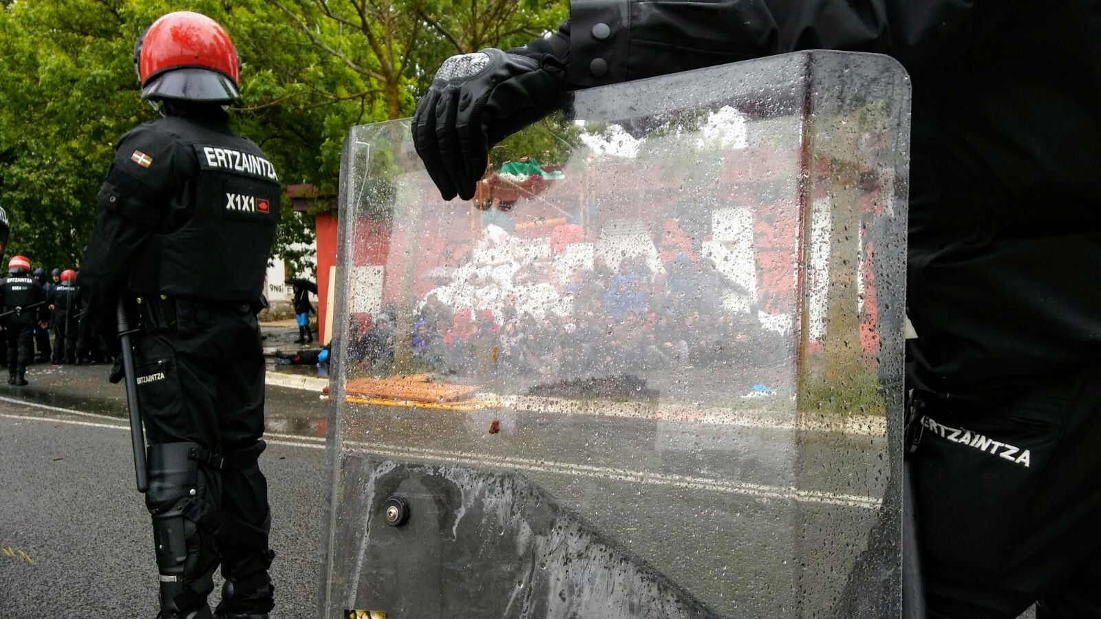 Efectivos de la policía autonómica del País Vasco, Ertzantza, en el barrio vitoriano de Errekaleor protegiendo a los trabajadores dela empresa eléctrica Iberdrola con orden del gobierno Vasco para cortar el suministro eléctrico al proyecto de autogestión que se desarrolla en el mismo.